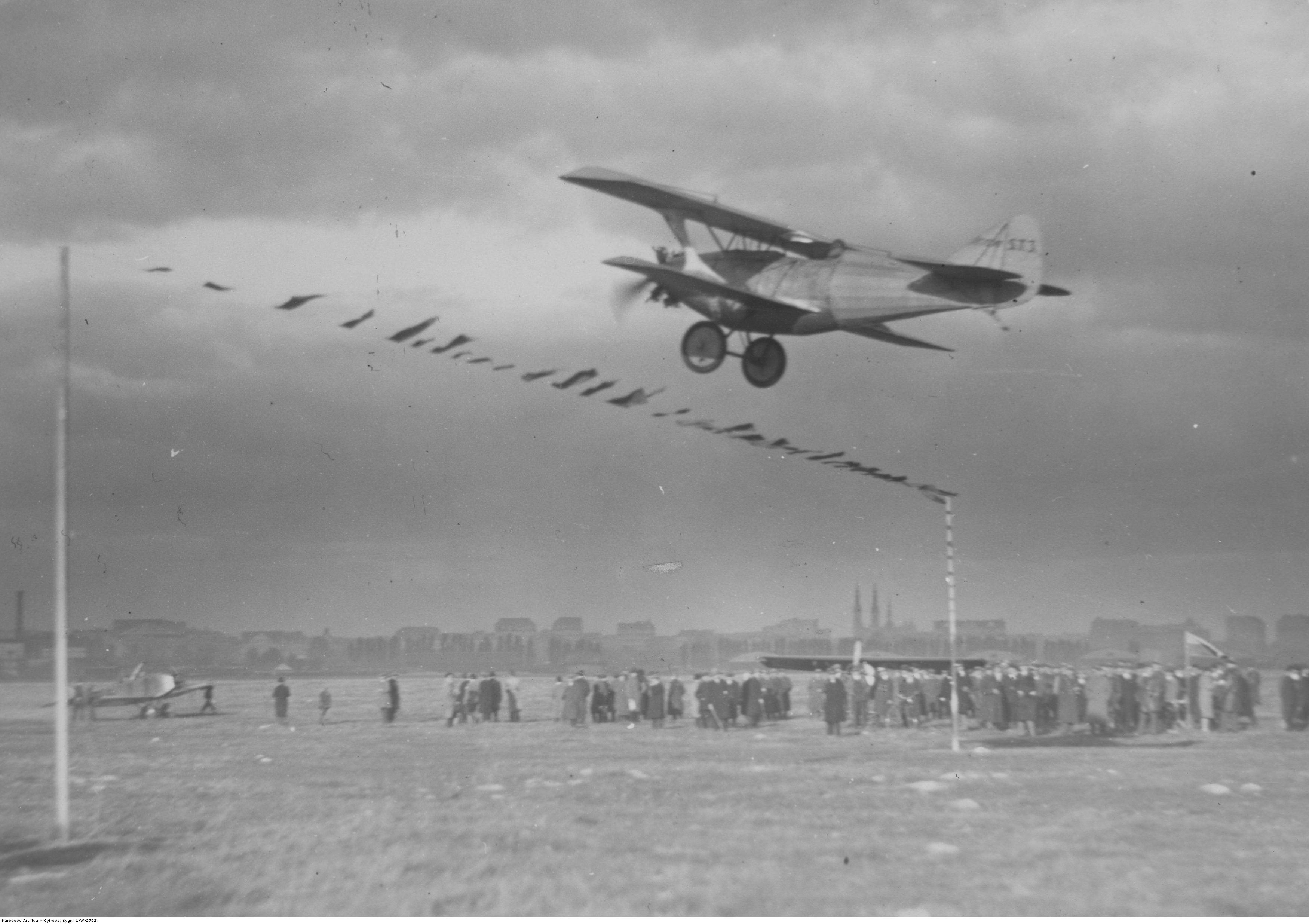 Samolot Skraba ST-3 ląduje na lotnisku mokotowskim podczas I Krajowego Konkursu Awionetek Ligi Obrony Powietrznej Państwa w Warszawie. Z lewej strony widoczny samolot JD-2.